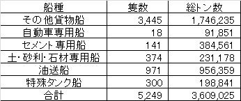 船種別内航船腹量